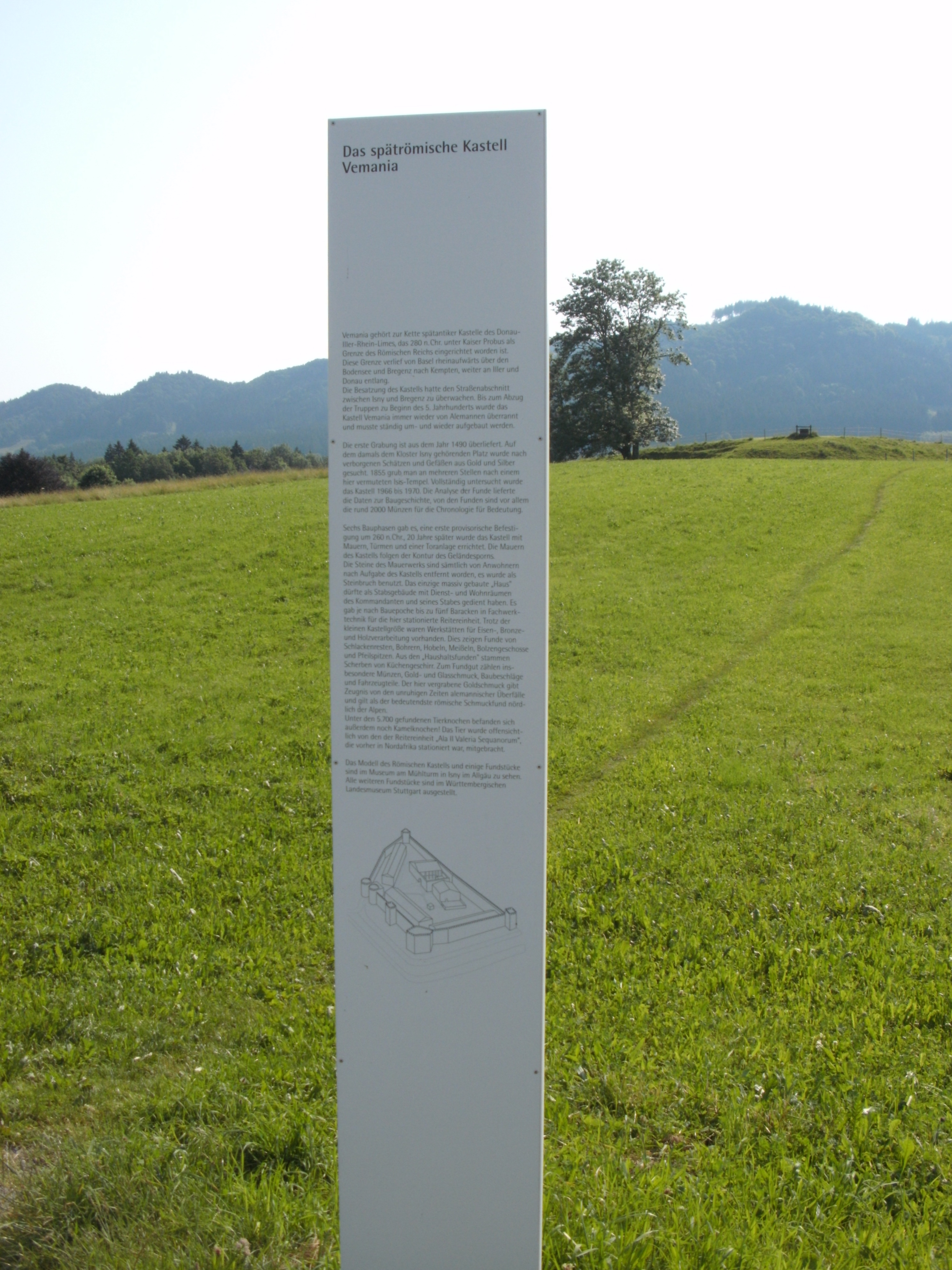 Römer Kastell Vemania Bettmauer Teilort von Isny im Allgäu - Schaubild am Fundplatz